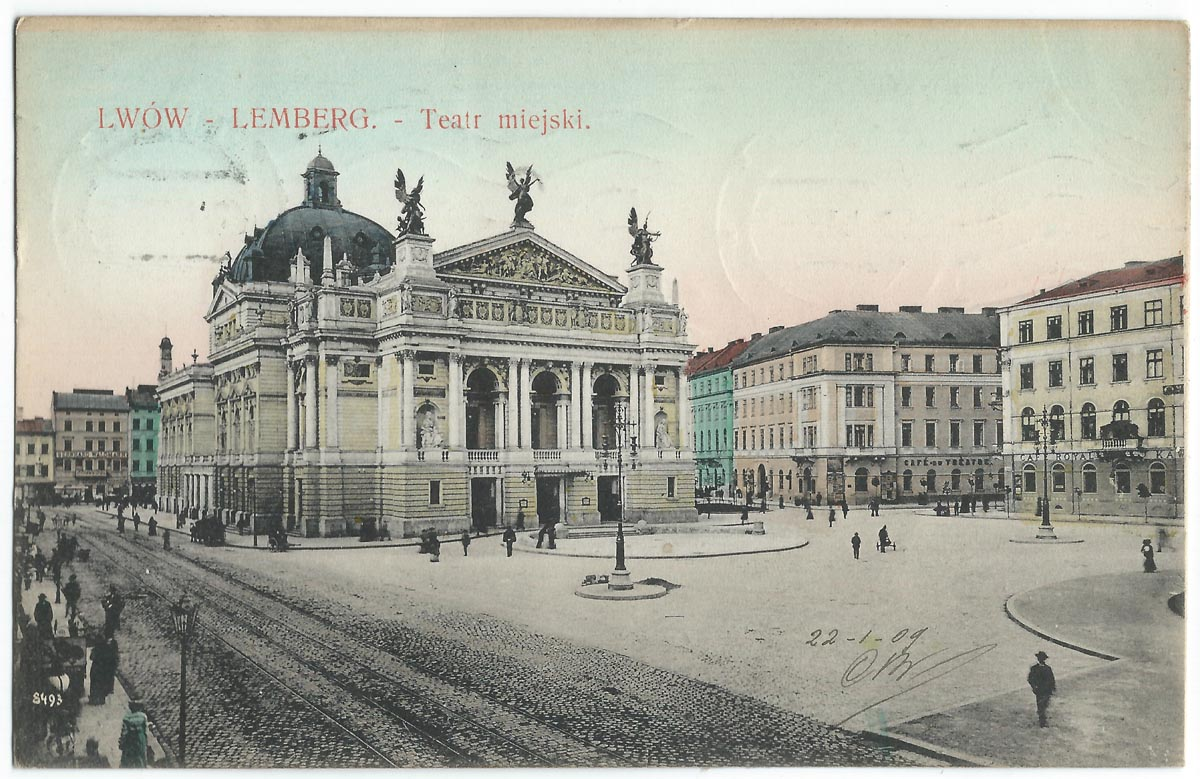 Vue de Lwow (ou Lemberg, aujourd'hui Lviv en Ukraine), dans l'empire austro-hongrois, au début du XXe siècle.